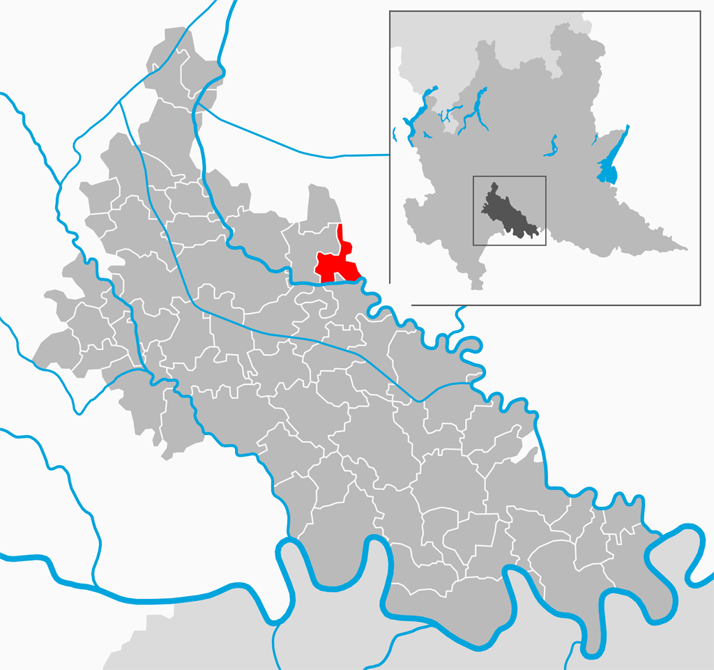 Il comune di Abbadia Cerreto nella provincia di Lodi